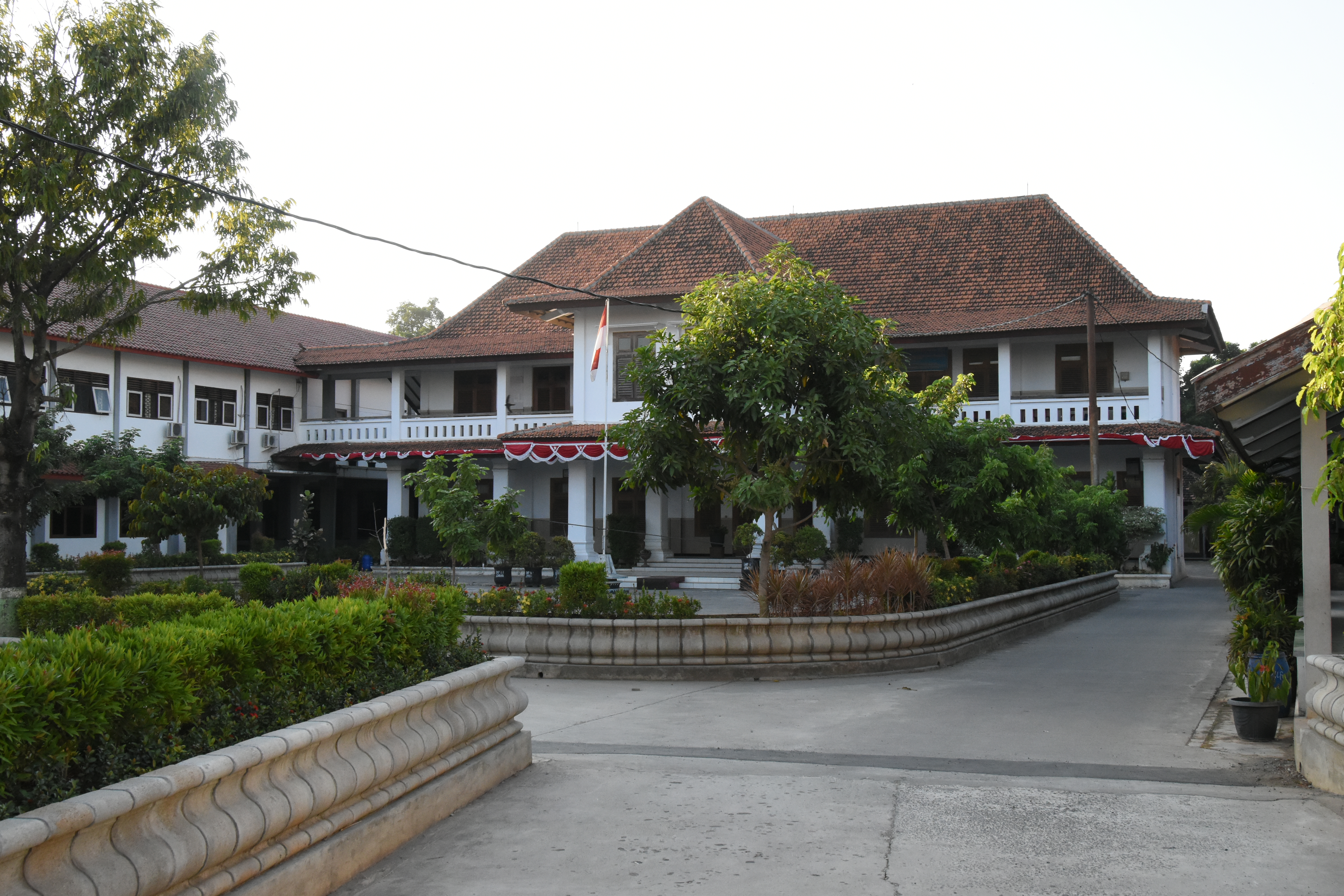 Salah satu sekolah di Juwana